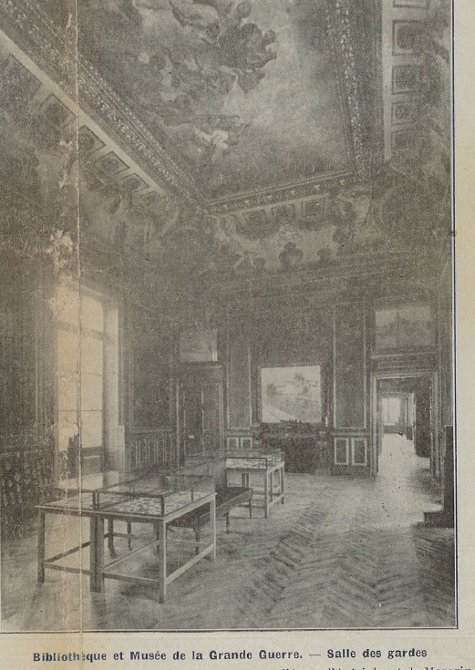 La photographie publiée dans une revue parisienne en 1932 représente une des premières salles du Musée (Médailles) au pavillon de la Reine (Château de Vincennes)